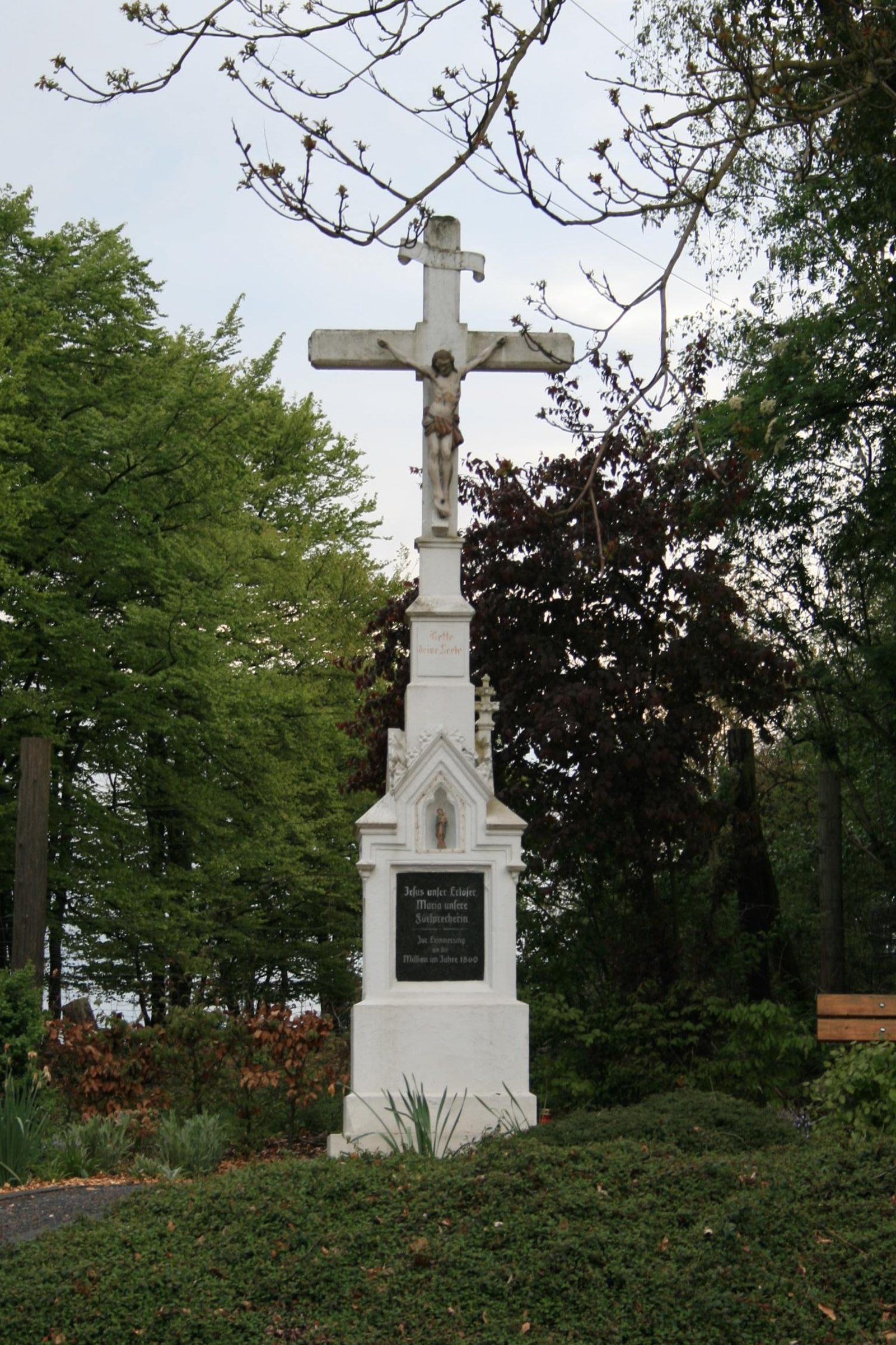 Denkmal in Mönchengladbach Wegekreuz, Rasseln in MG-Rasseln